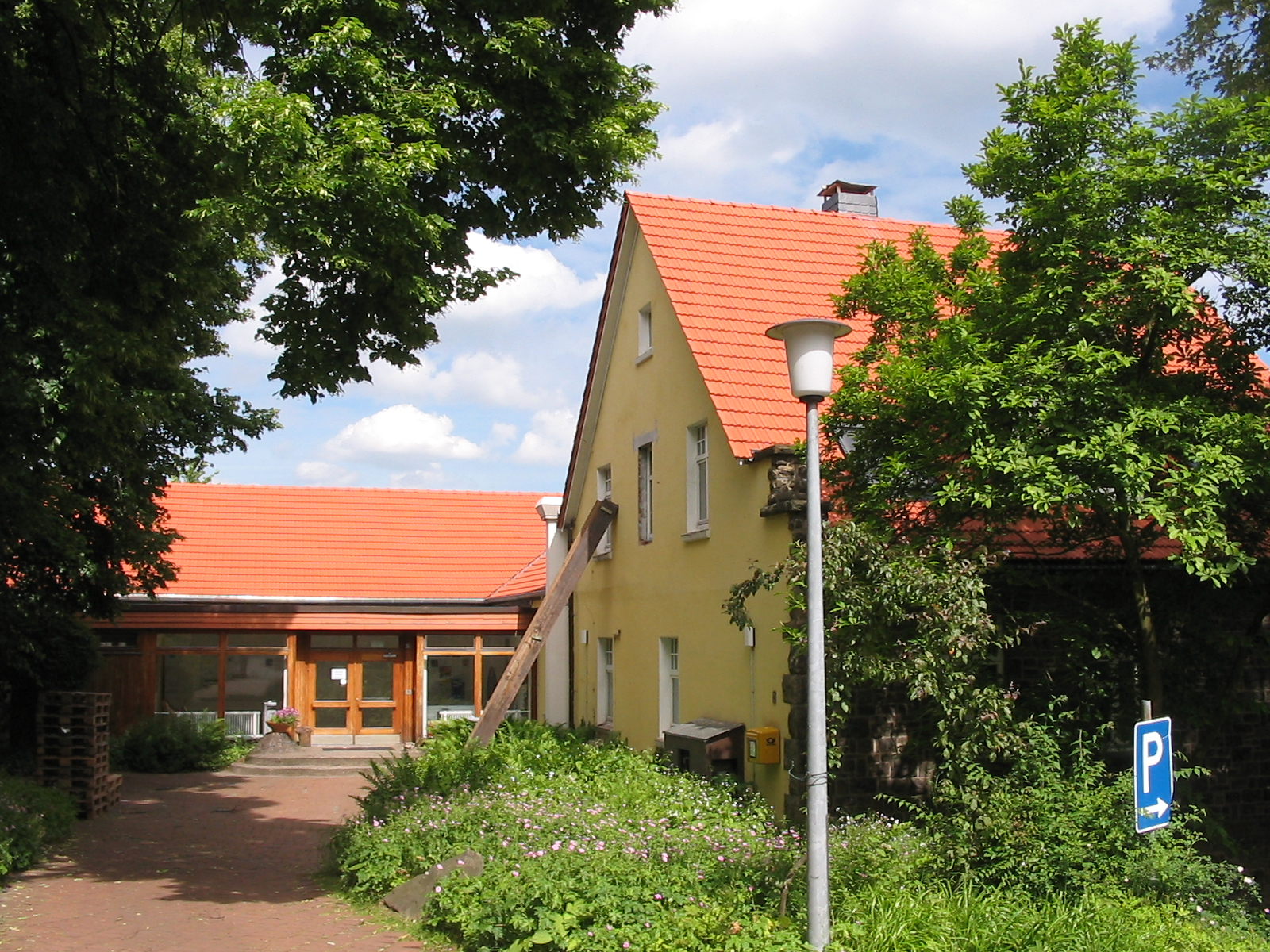 Institut für Waldorf-Pädagogik, Witten-Annen: Altbau; bis 1974 Evangelisches Jugenderholungslandheim Annener Berg